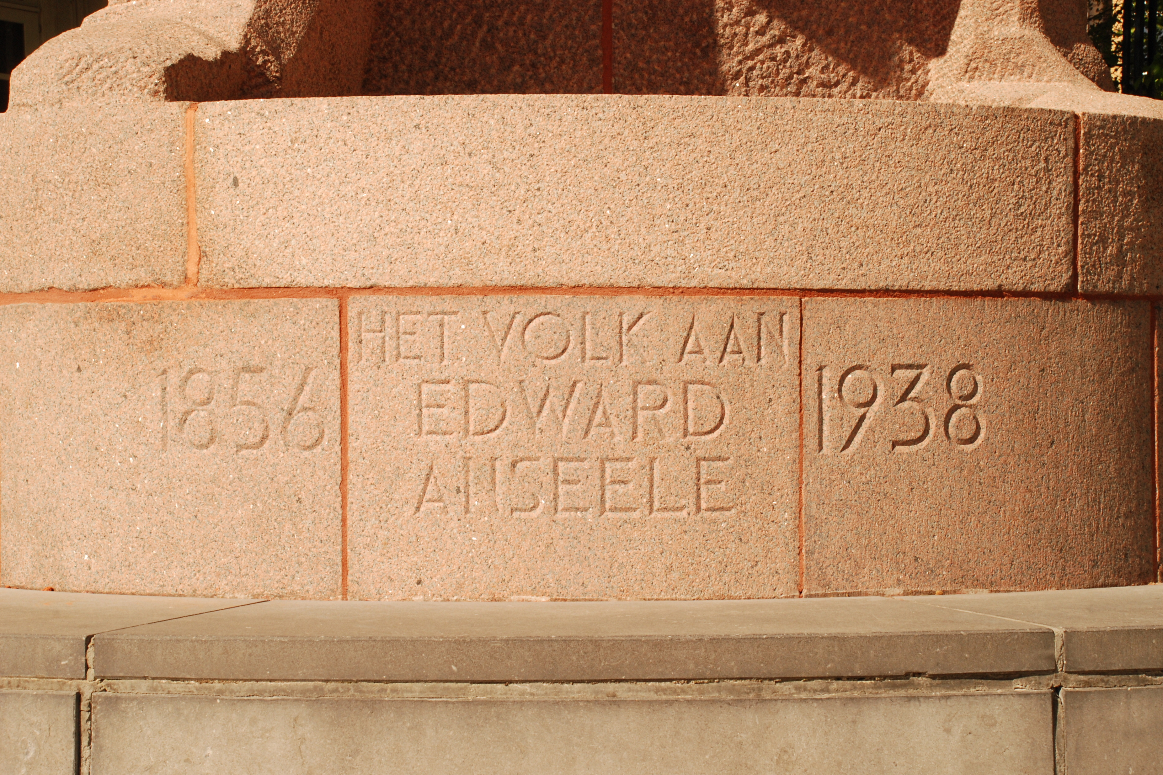 Belgique - Gand - place de France (Frankrijkplein) - Monument Anseele This photo of immovable heritage has been taken in the Flemish Region